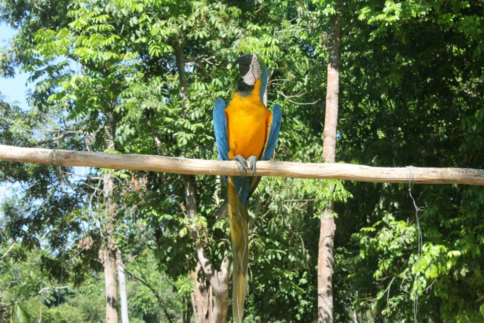 ARARA AZUL e AMARELA